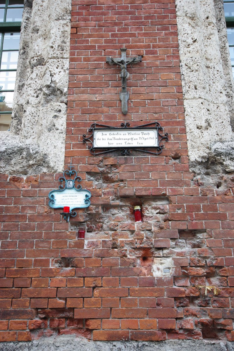 Alte Saline, 83435 Bad Reichenhall (u.a. Bauensemble E-1-72-114-9) Kreuz und Gedenktafeln für Opfer des Bombenangriffs auf Bad Reichenhall im April 1945, an der Einfahrt zum südlichen Innenhof.This is a photograph of an architectural monument.